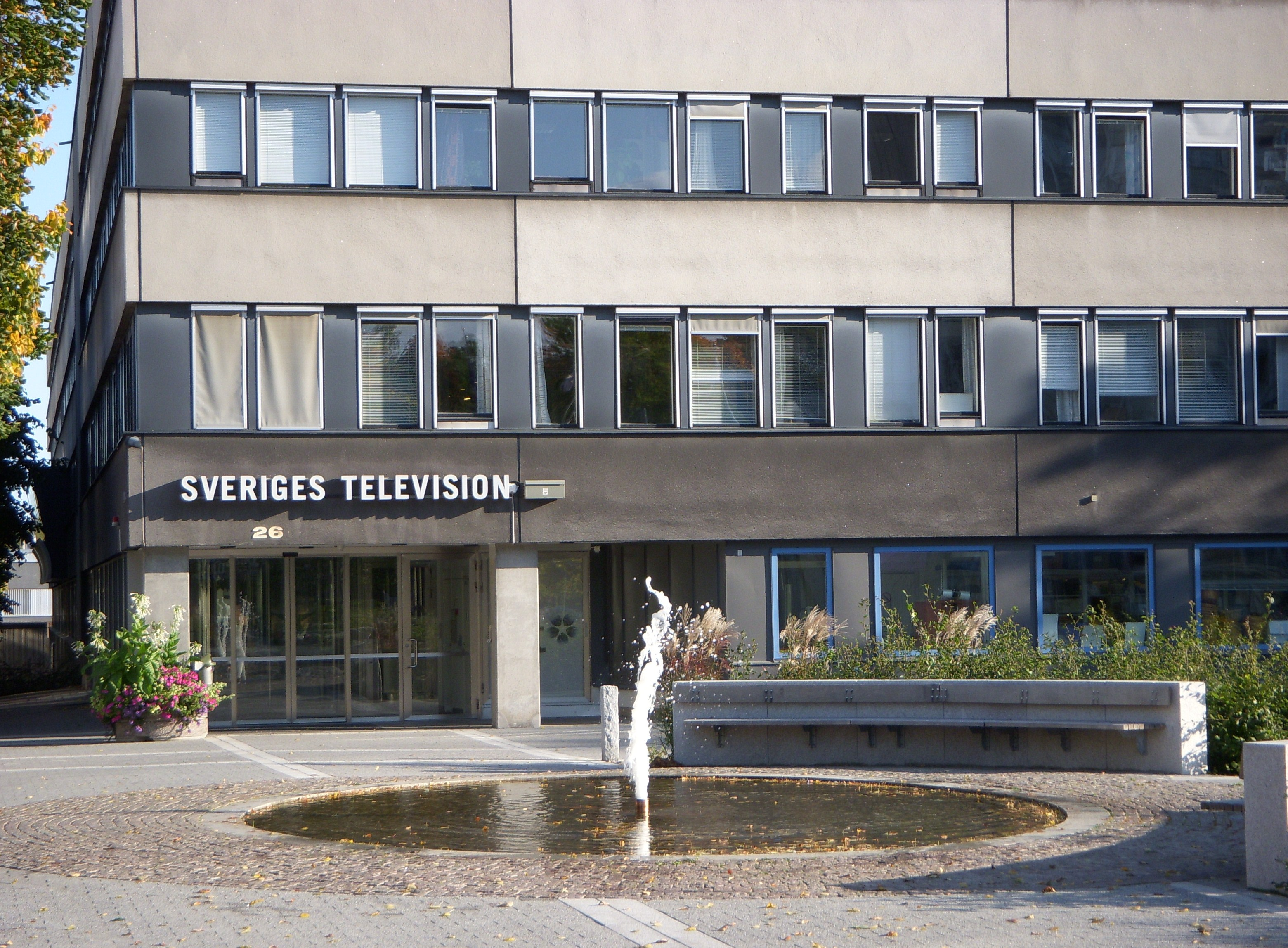 Sveriges Television, byggnad i Stockholm